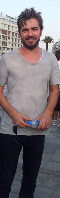 Engin Altan Düzyatan Konak, İzmir'de, 2013.